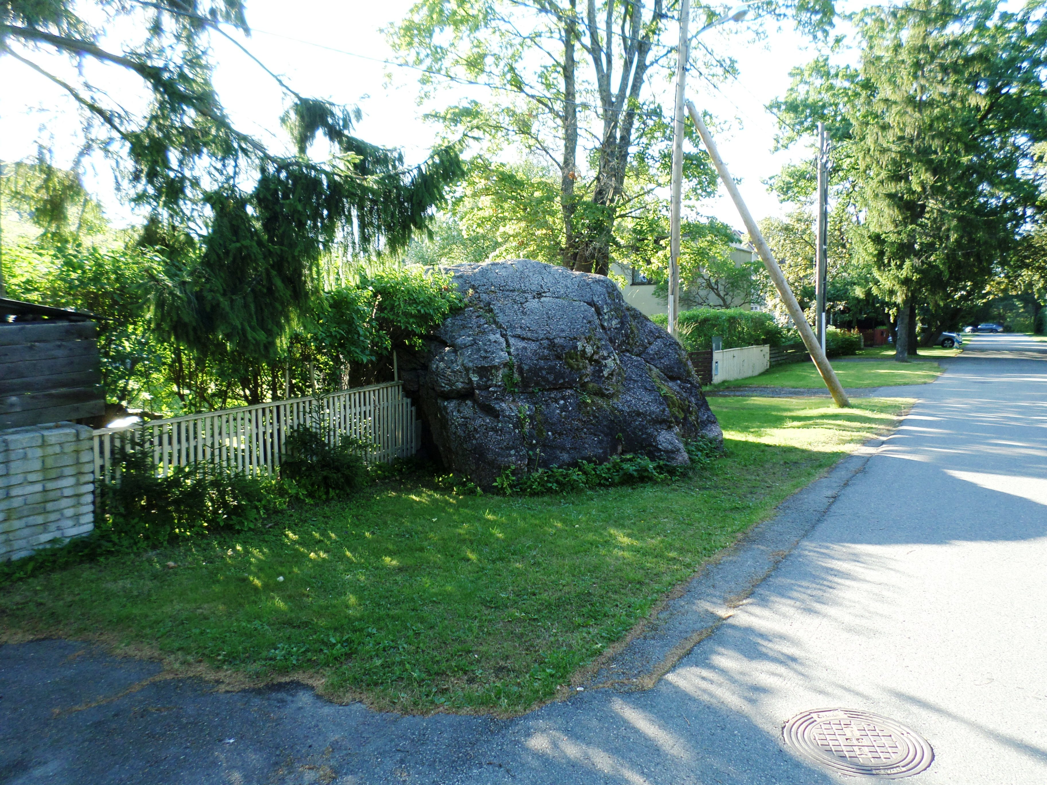 Hiidrahn Kuradisadul Tallinnas Kosel, Nurmiku teel.